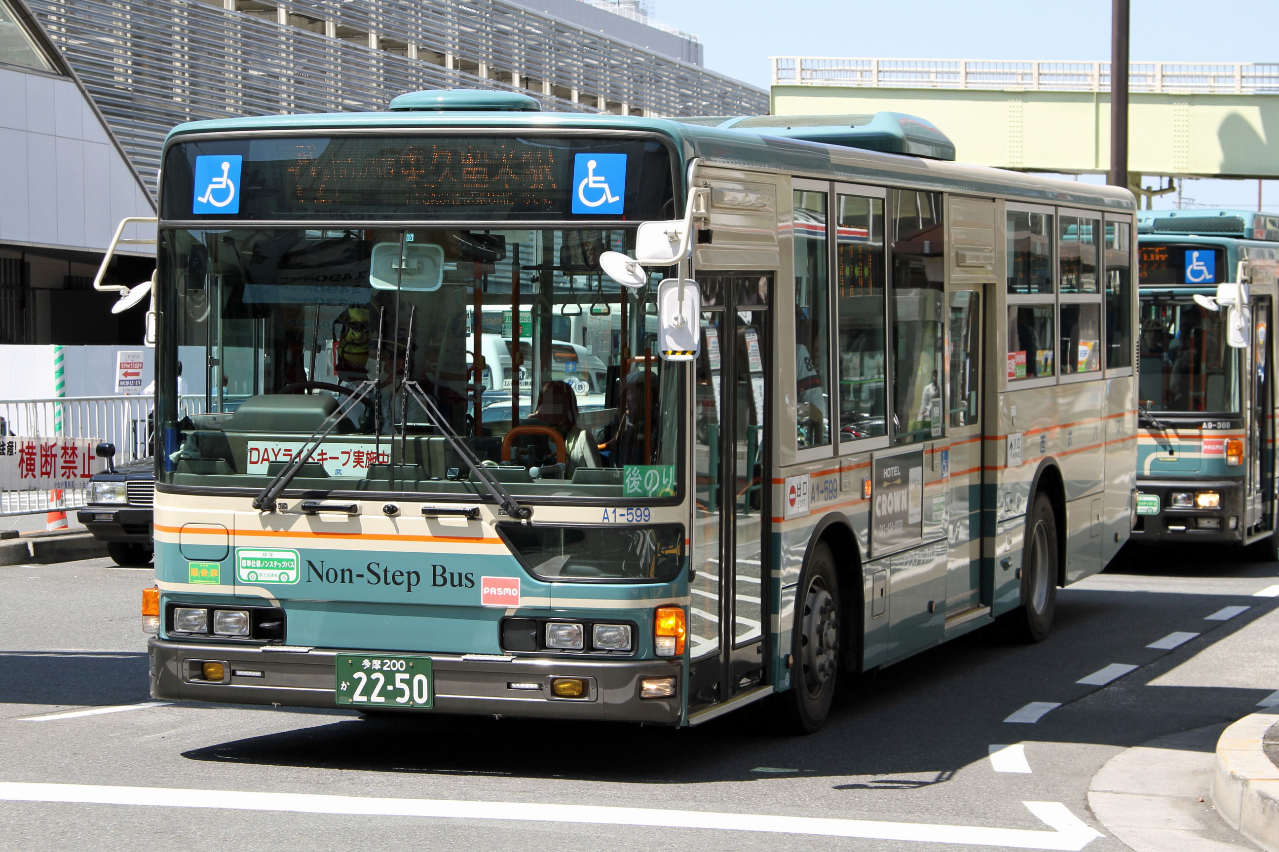 Seibu Bus car 西武バスの車両